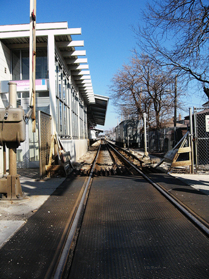 Photo de Kostner